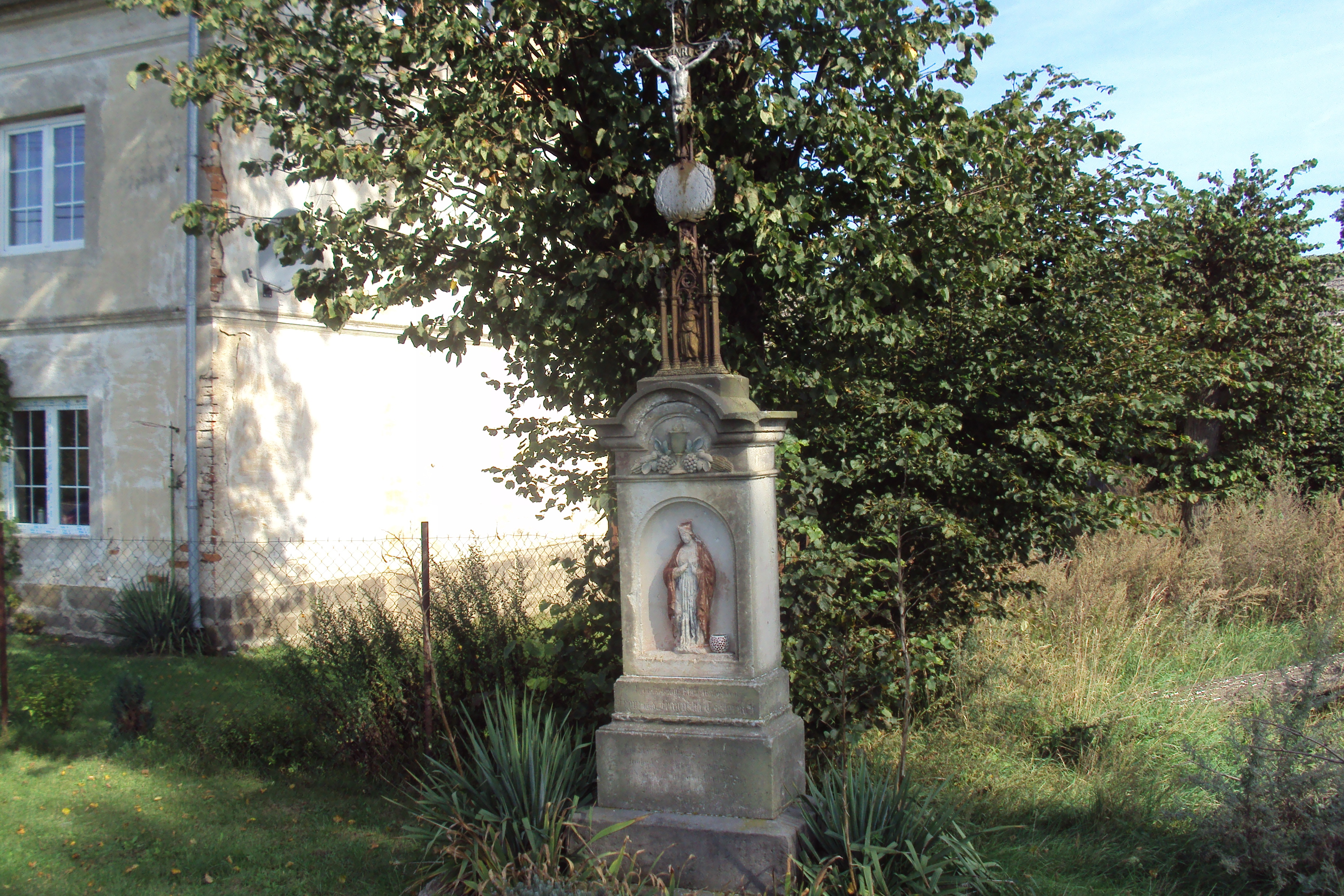 Křížek v osadě Veselí na Zákupsku